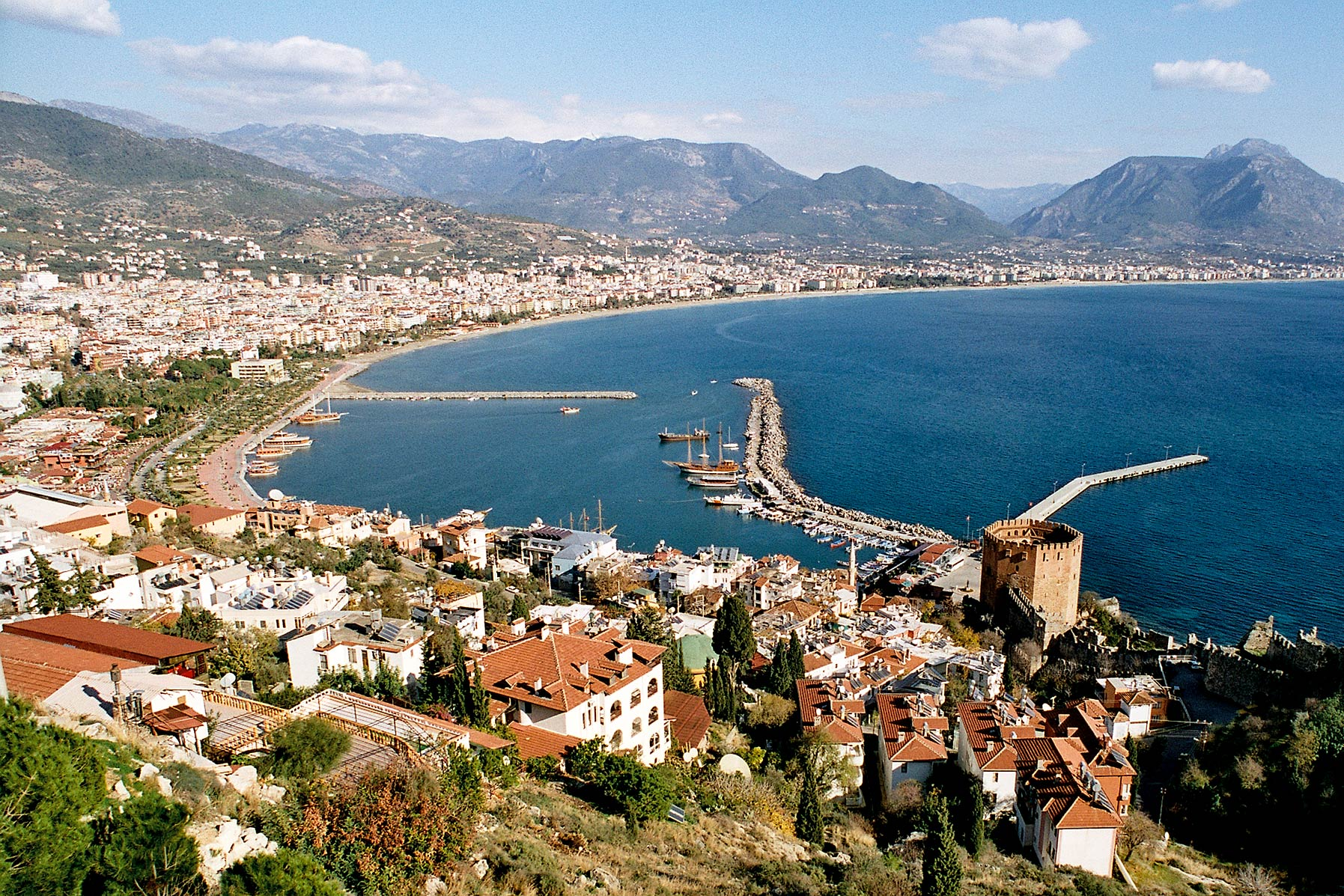 Blick auf Alanya, den Hafen und den roten Turm